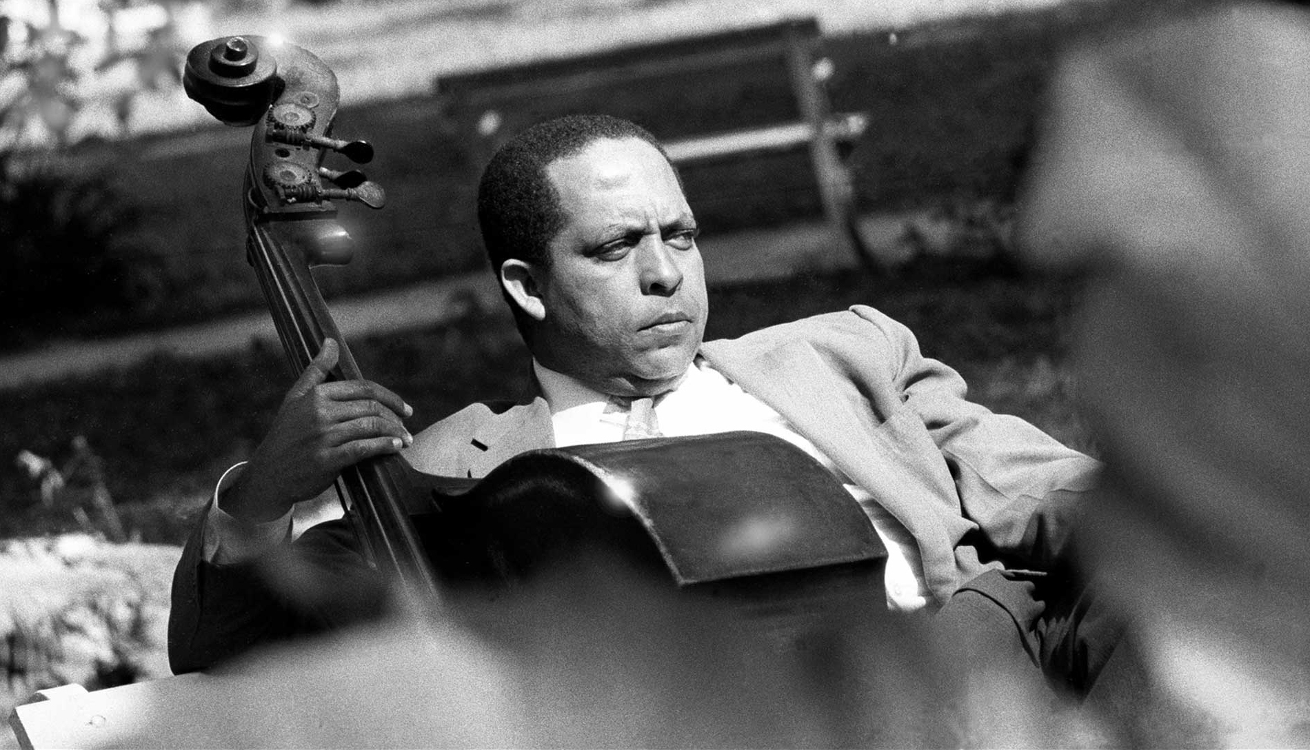 Cachao in Havana, Cuba, 1960.